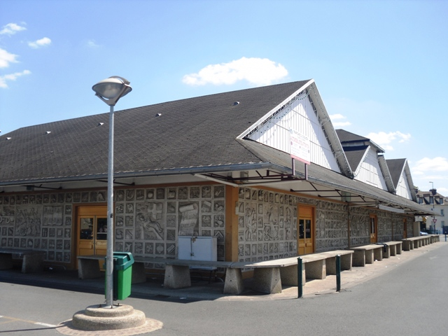 La halle du marché couvert de Sainte-Geneviève-des-Bois (91)